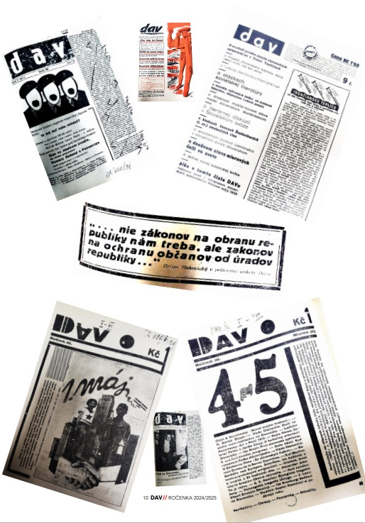 Koláže obálok DAVe